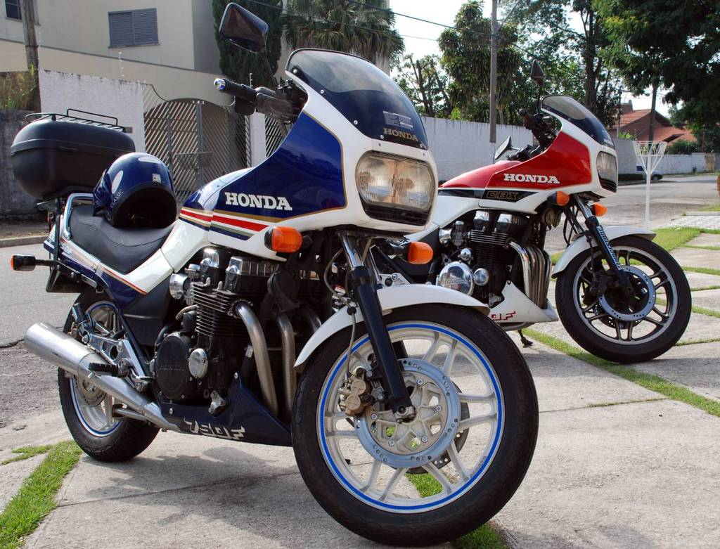 CBX 750F Rothmans e Hollywood, lado-a-lado.